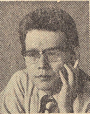 1973년 이전, 경향신문 특파원이던 이어령.